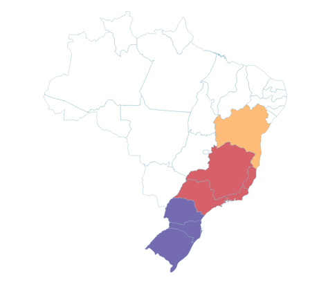 Ocorrência de Dicksoniaceae no Brasil